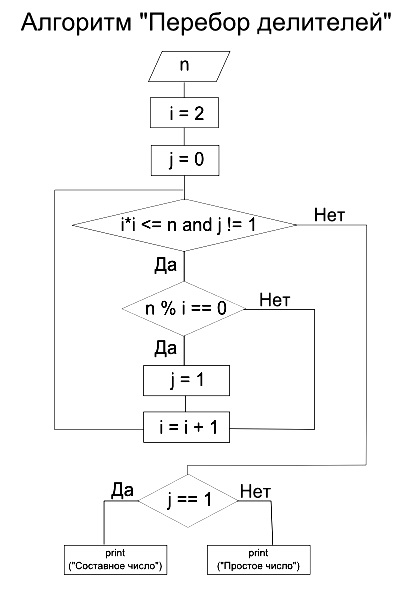 Алгоритм "Перебор делителей"